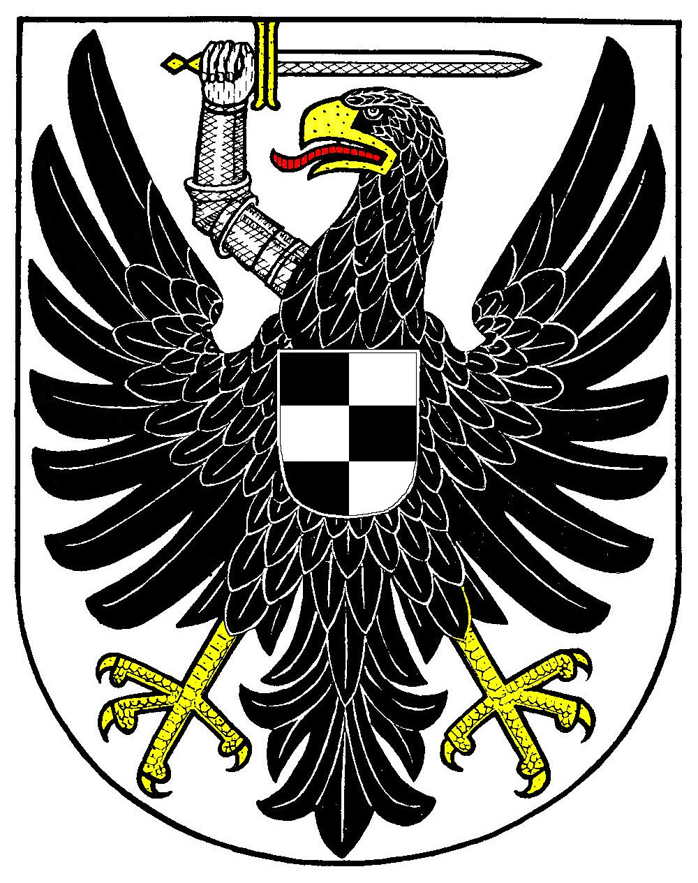 1929 bis 1938 von der preußischen Provinz Grenzmark Posen-Westpreußen geführtes Wappen.